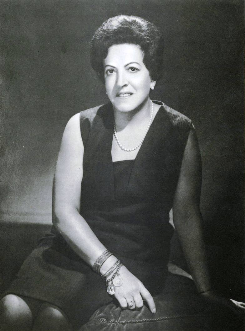 María Ruiz-Tagle Jiménez (Santiago, 15 de abril de 1913 - Santiago, 10 de abril de 2001) fue la primera dama de Chile entre 1964 y 1970, como esposa del presidente Eduardo Frei Montalva